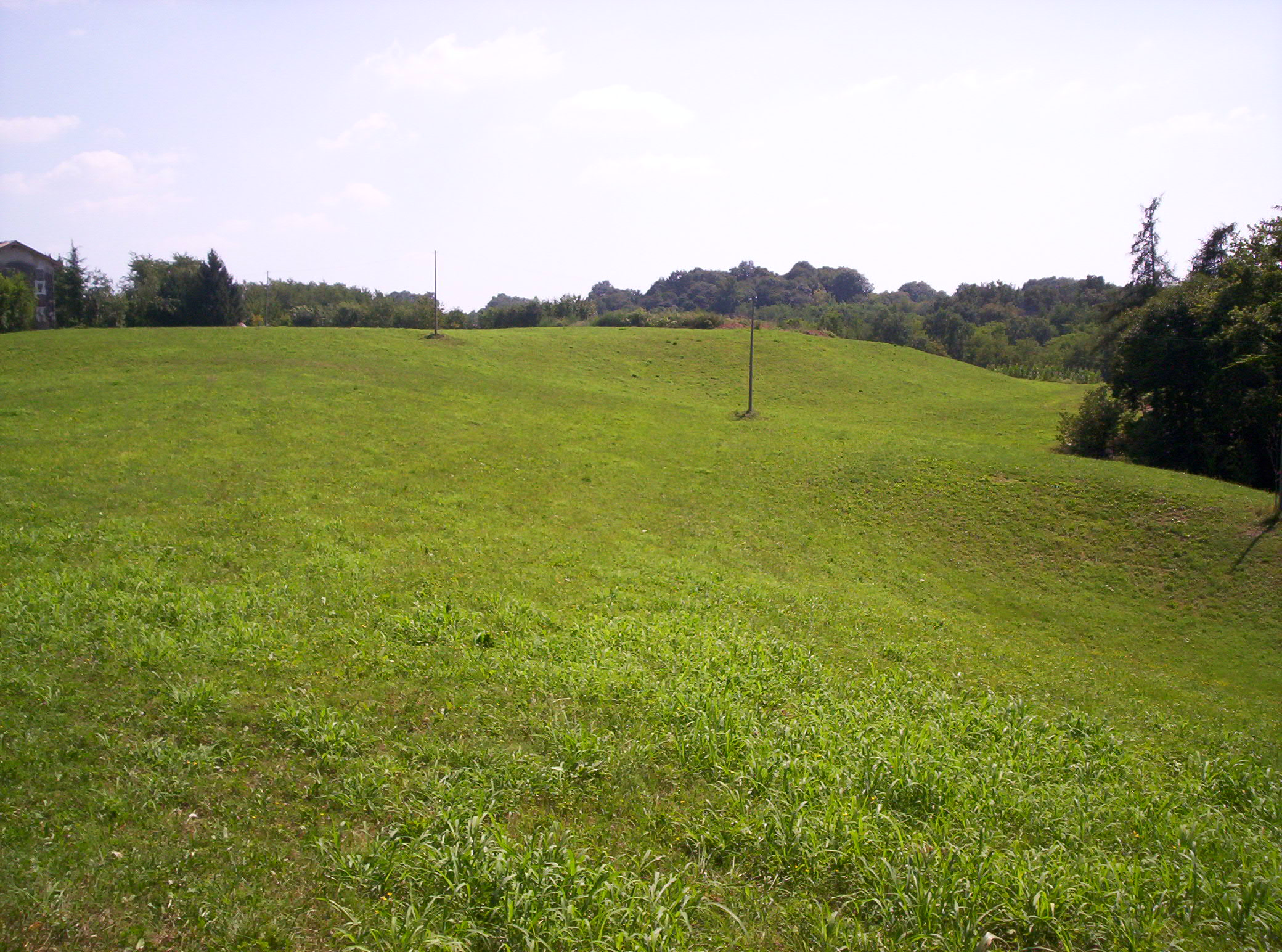 Questa è parte dell' area in cui sorgeva la Certosa del Montello